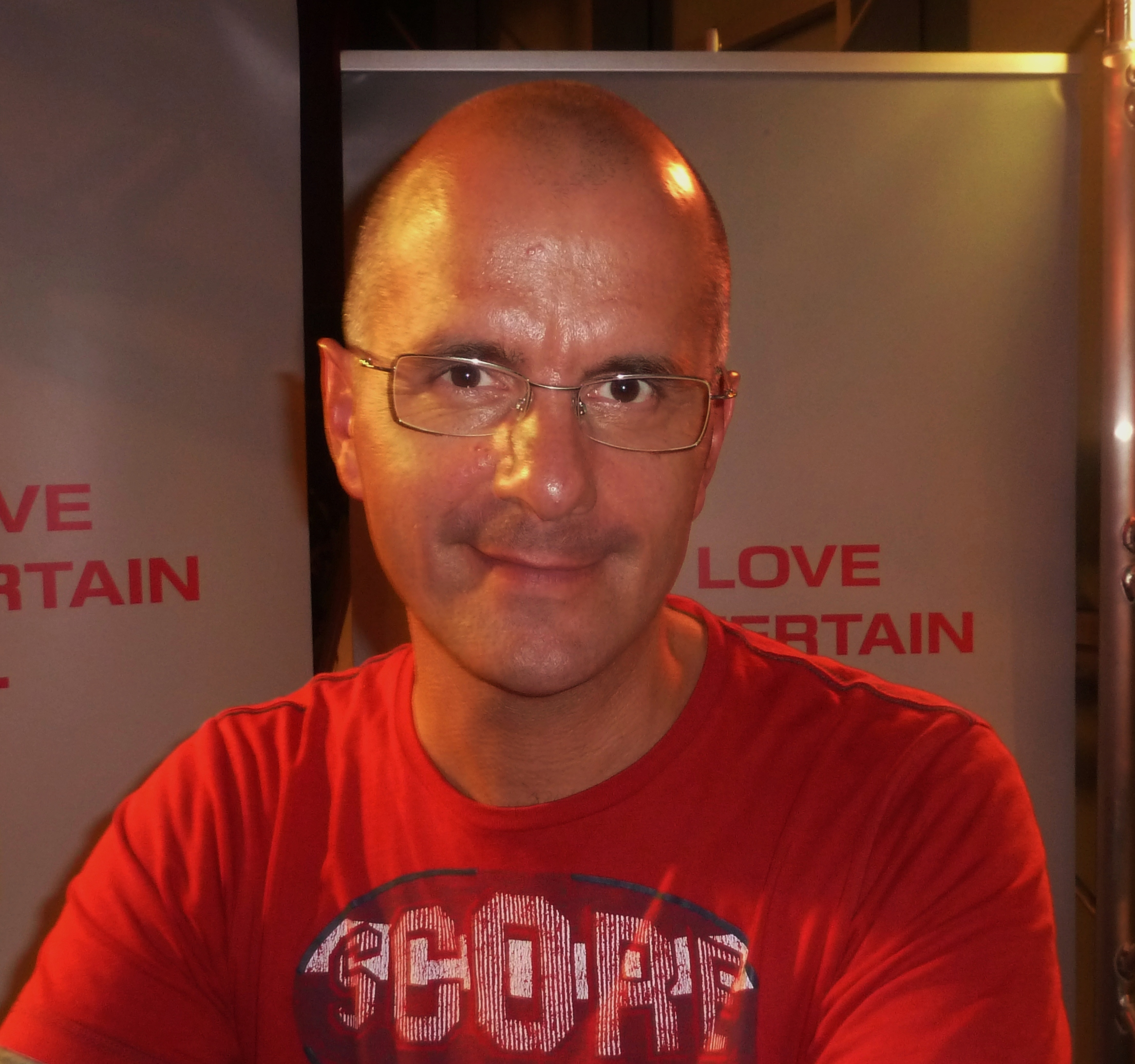 Christoph Maria Herbst nach einer Veranstaltung in der Vest Arena in Recklinghausen im Rahmen seiner Lesetournee "Ein Traum von einem Schiff"